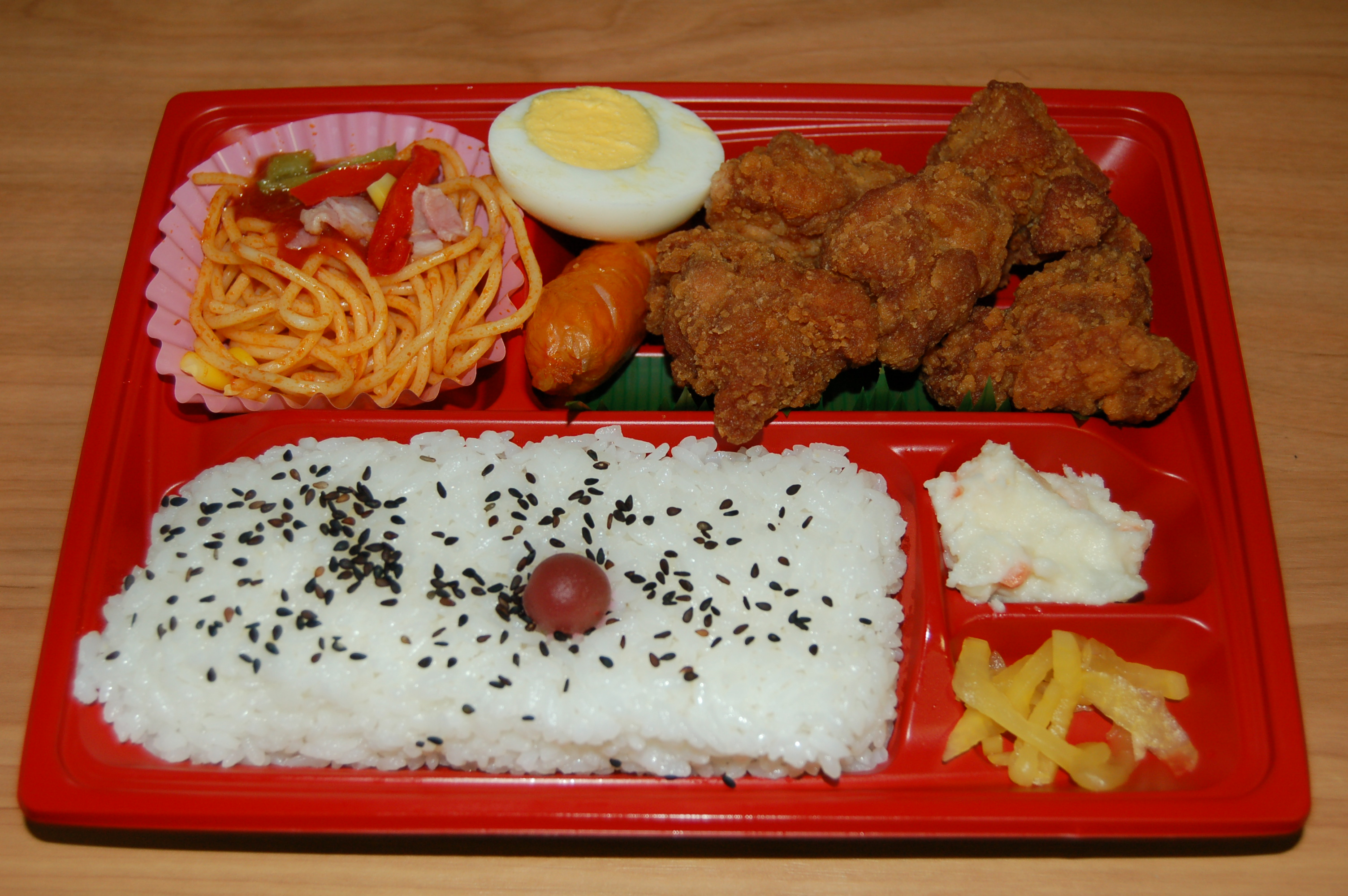 Japanese Bento. By Andre Gabriel.